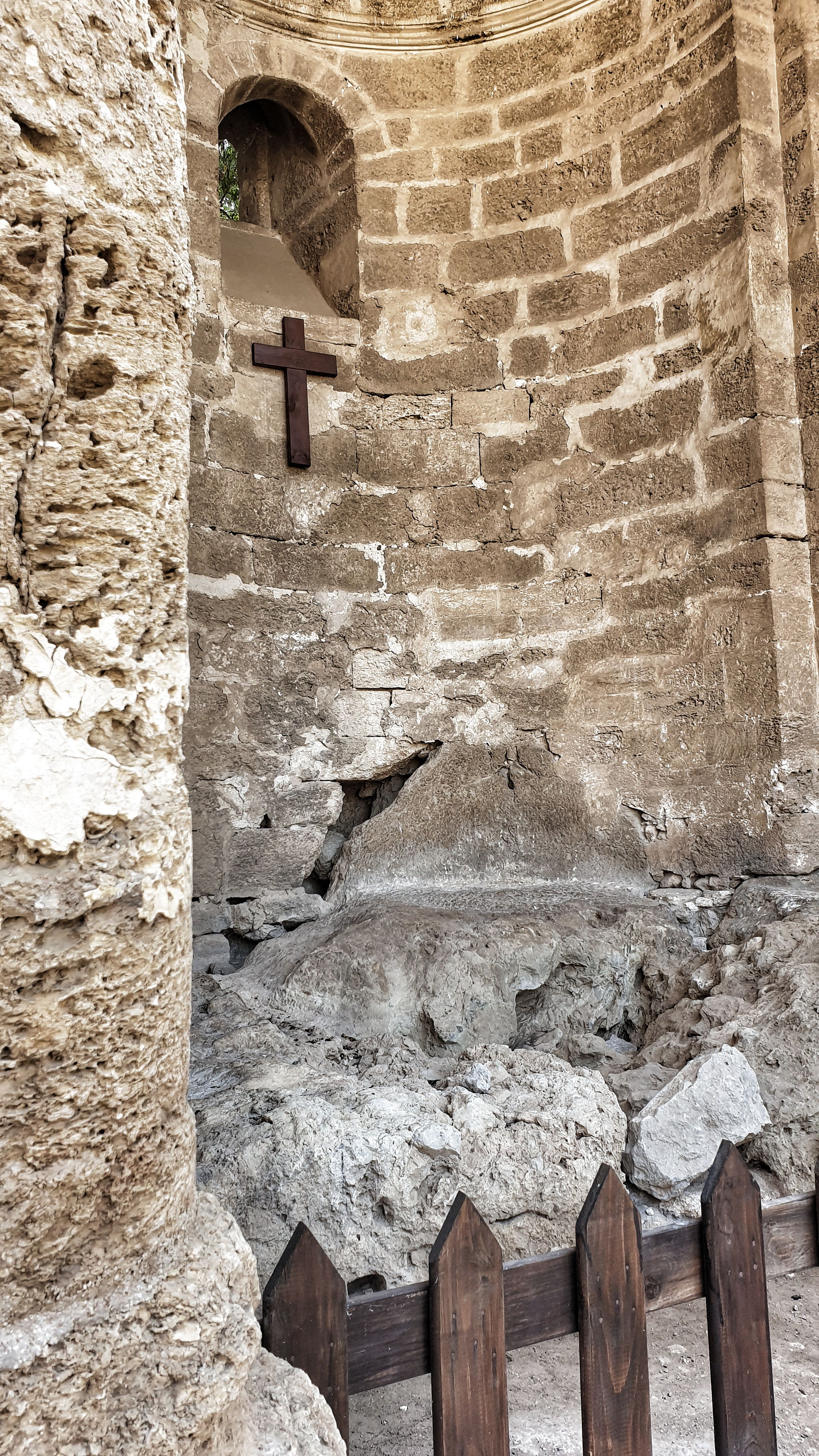 على هذه الصخور ولدت مريم العذراء لأمها حنة بنت فاقوذا.